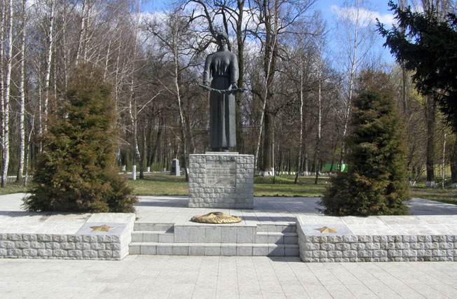 Zgurivka_park_ost4.jpg: Меморіал Слави у Згурівському дендропарку, квітень 2007 року